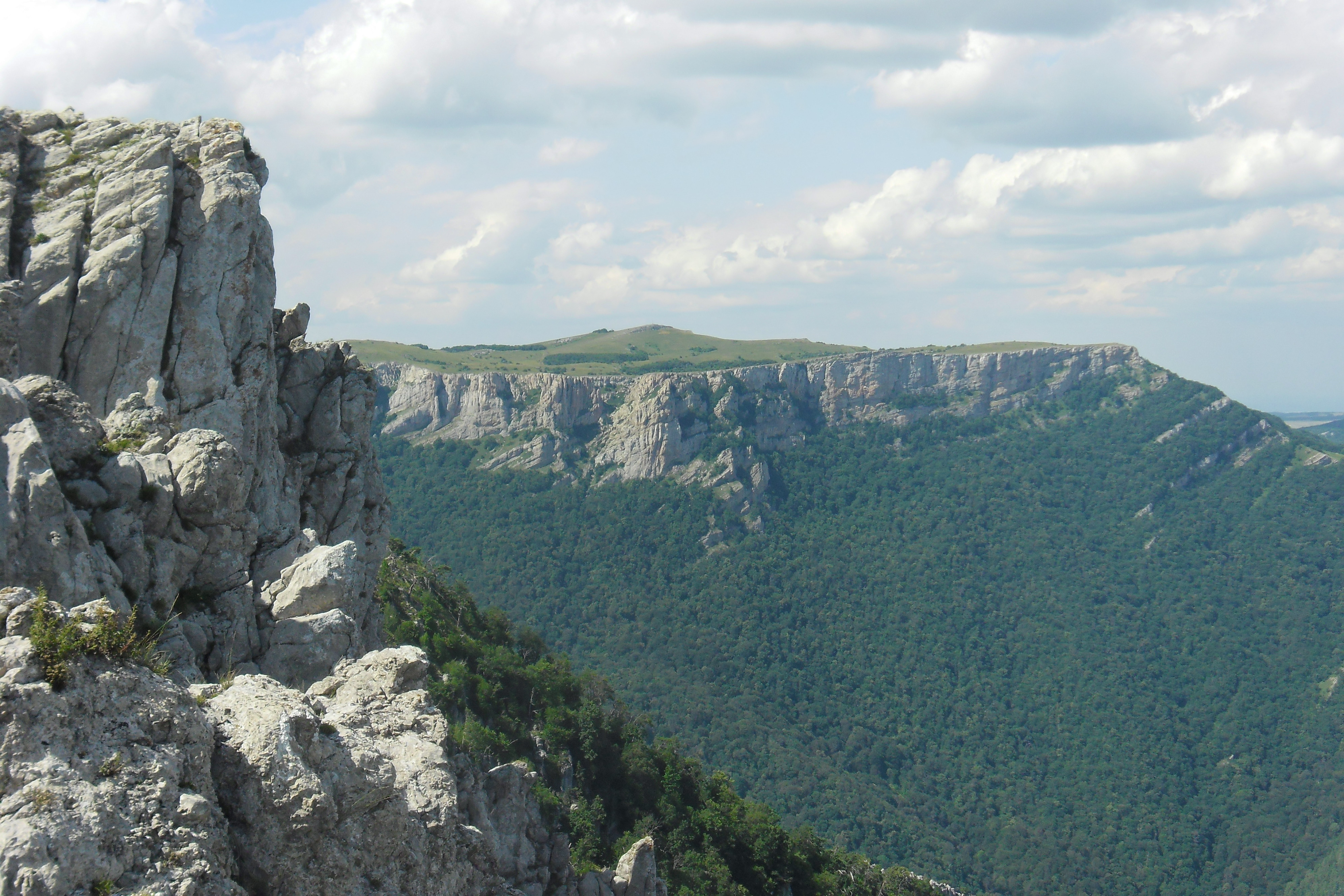 Фото